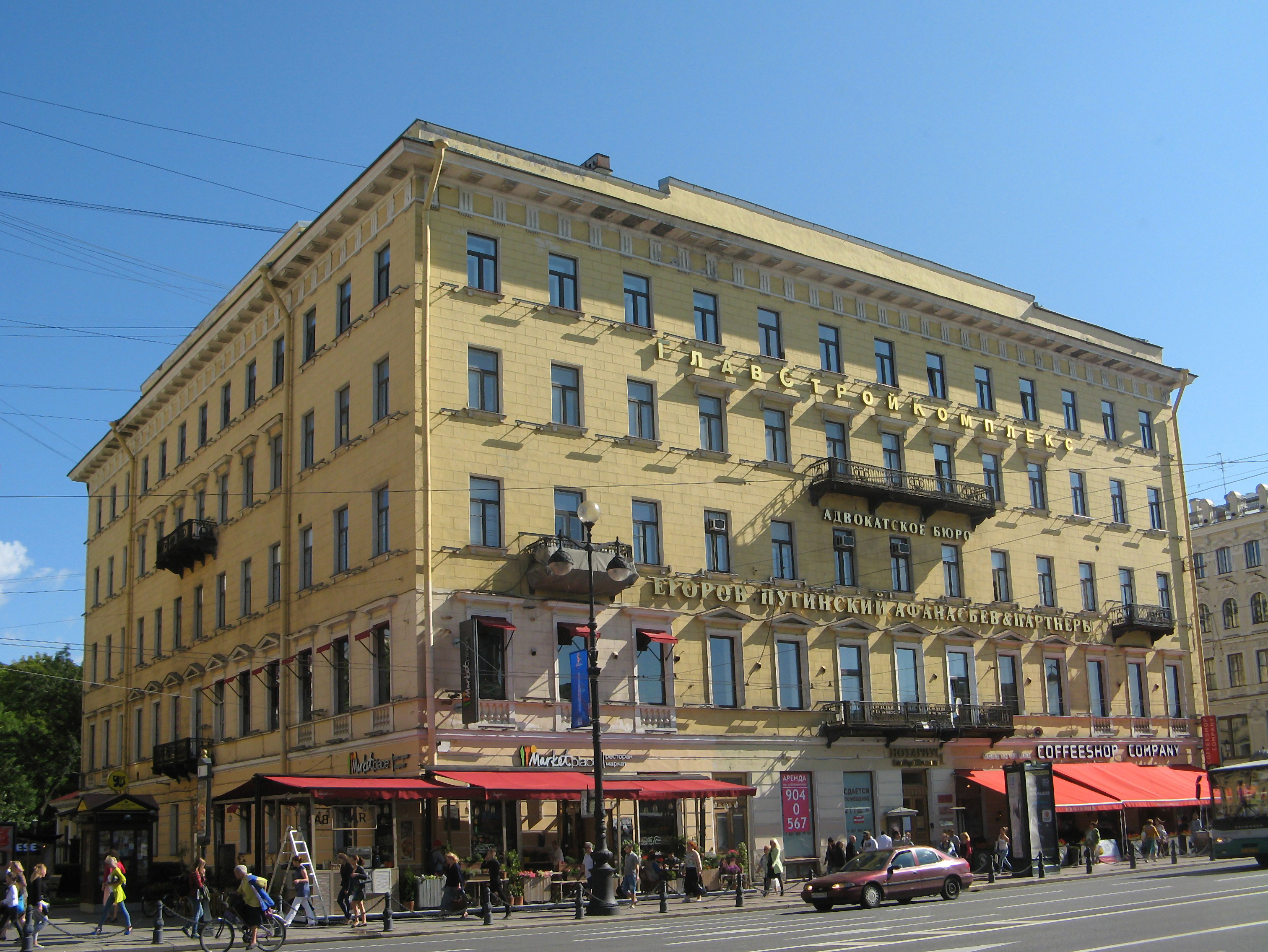 Ансамбль евангелическо-лютеранской церкви святого Петра. Дом жилой с двумя служебными флигелями: Невский проспект, 24, Малая Конюшенная улица, 9, Центральный район, Санкт-Петербург